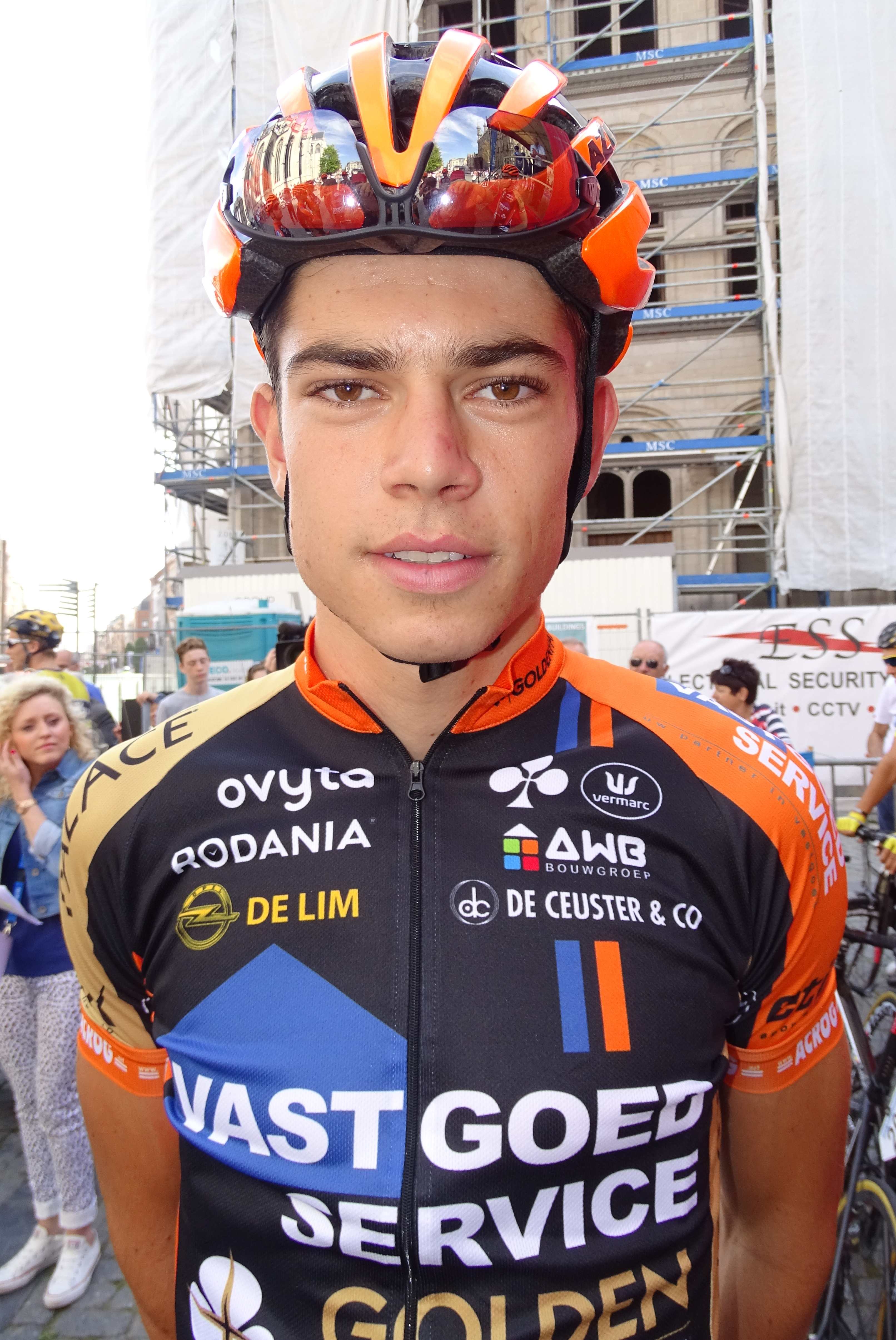 Reportage réalisé le dimanche 23 août à l'occasion du départ et de l'arrivée du Grand Prix Jef Scherens 2015 à Louvain, Belgique.